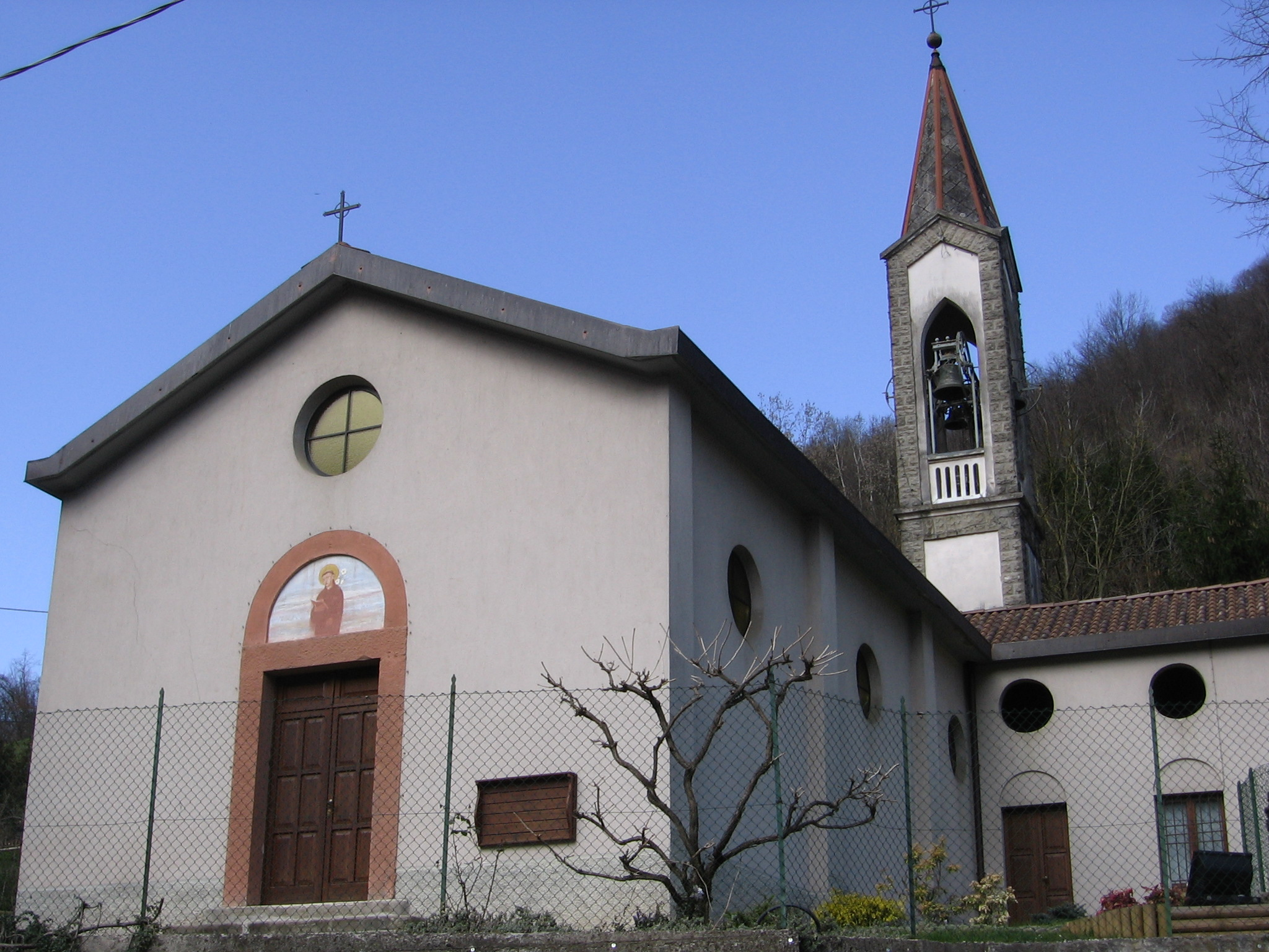 Chiesa di sant'Antonio, loc. valle Rossa. Cene (BG), Italia